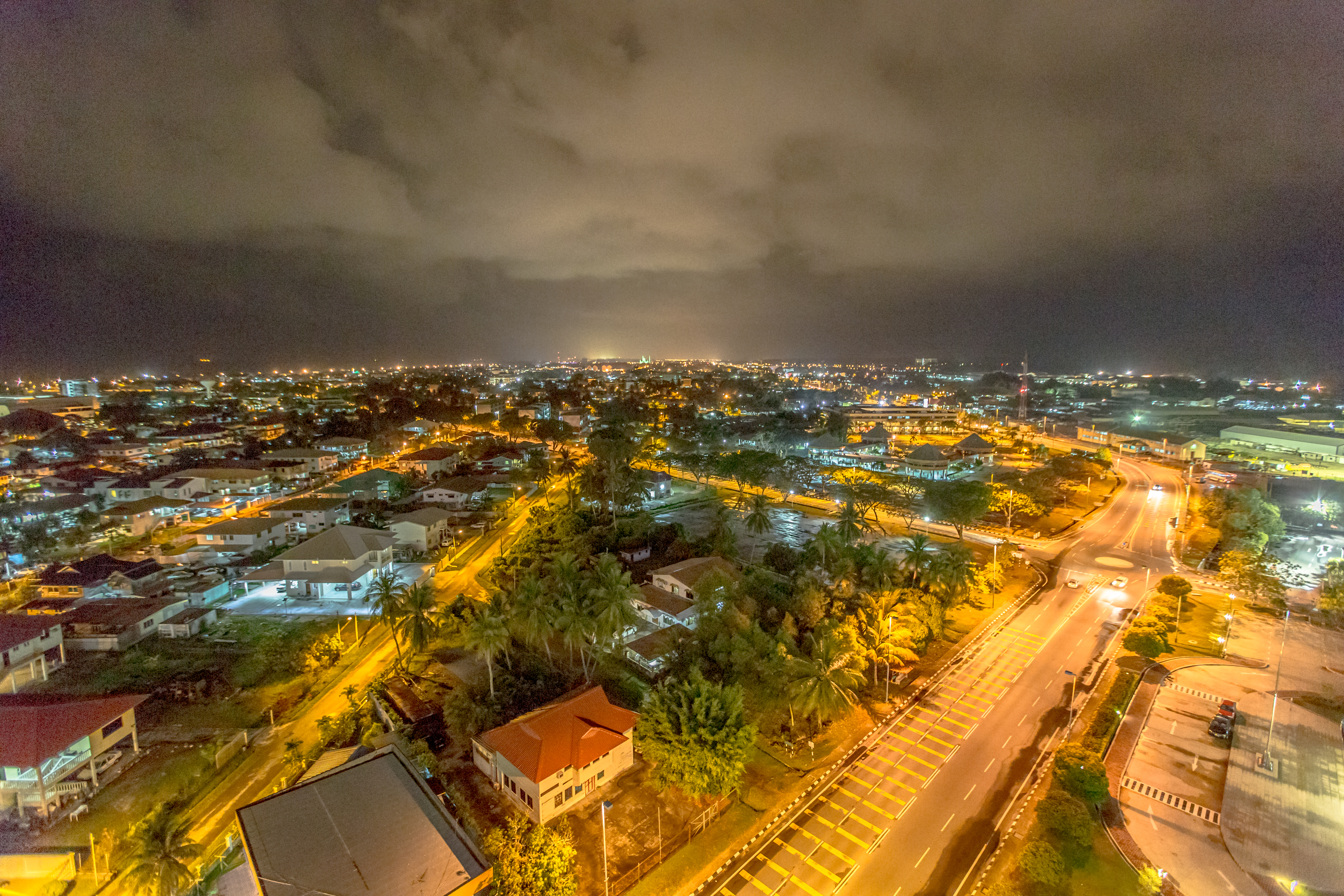 Kuala Belait, Brunei Darussalam